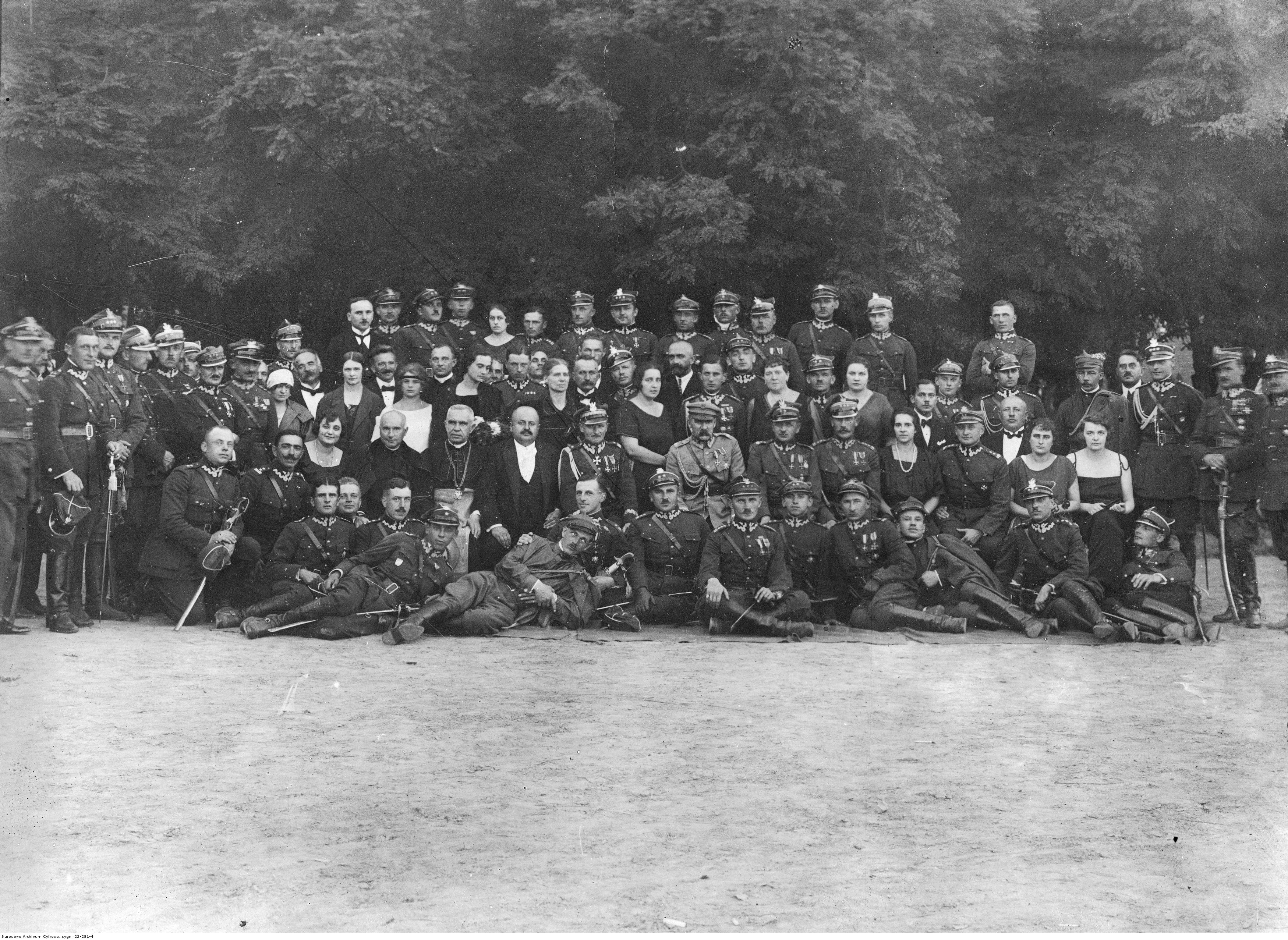 Fotografia grupowa uczestników uroczystości. Widoczni m.in.: marszałek Józef Piłsudski (w drugim rzędzie, w jasnym mundurze), gen. Marian Kukiel (siedzi na lewo od marszałka), por. Jerzy Jabłonowski (stoi za marszałkiem), Walery Sławek (na lewo za por. Jabłonowskim, w garniturze), biskup łucki Ignacy Dub-Dubowski (3. na lewo od marszałka), por. Michał Galiński (2. na prawo od Walerego Sławka).